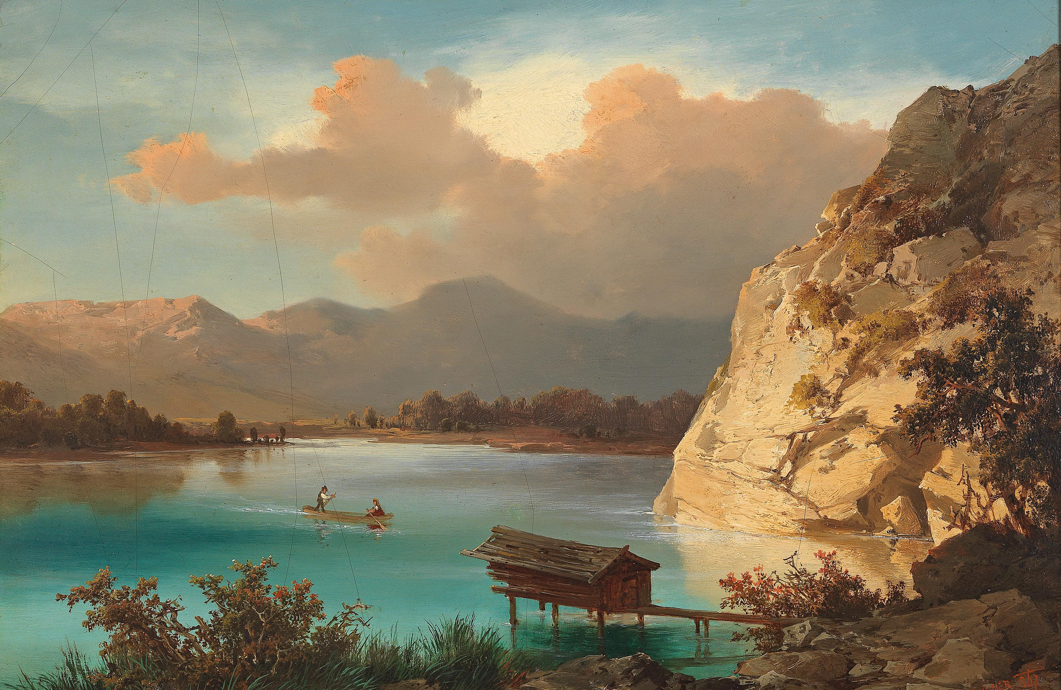 Partie aus dem Salzkammergut (?), signiert, datiert Jos. Brunner (1)867, Öl auf Karton, 30 x 45 cm